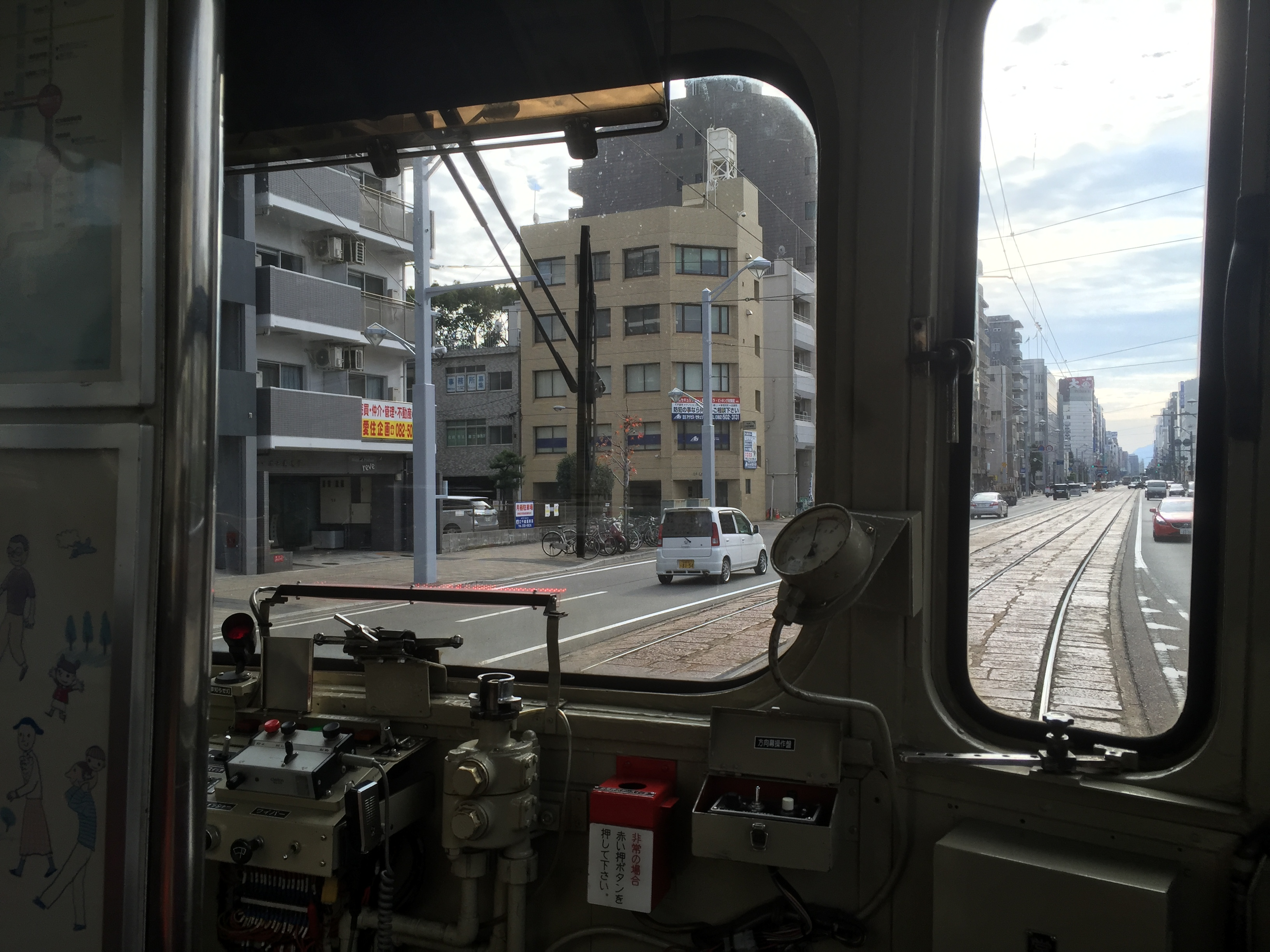 広島路面電車の白島線